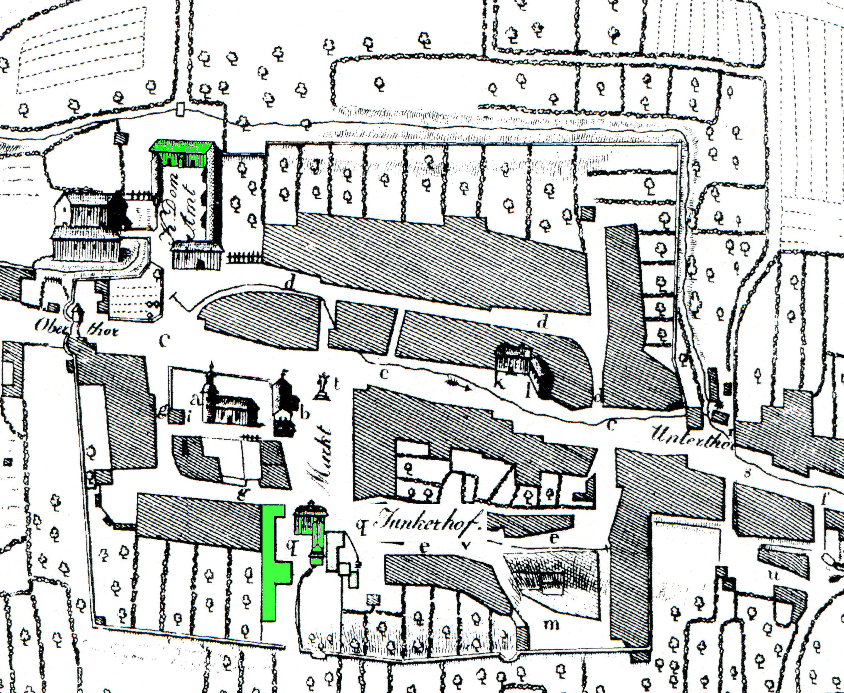 Gebäude des Patrimonialgerichts und des Junkerhofes der Bültzingslöwen im 16. Jahrhundert in Worbis (Eichsfeld)